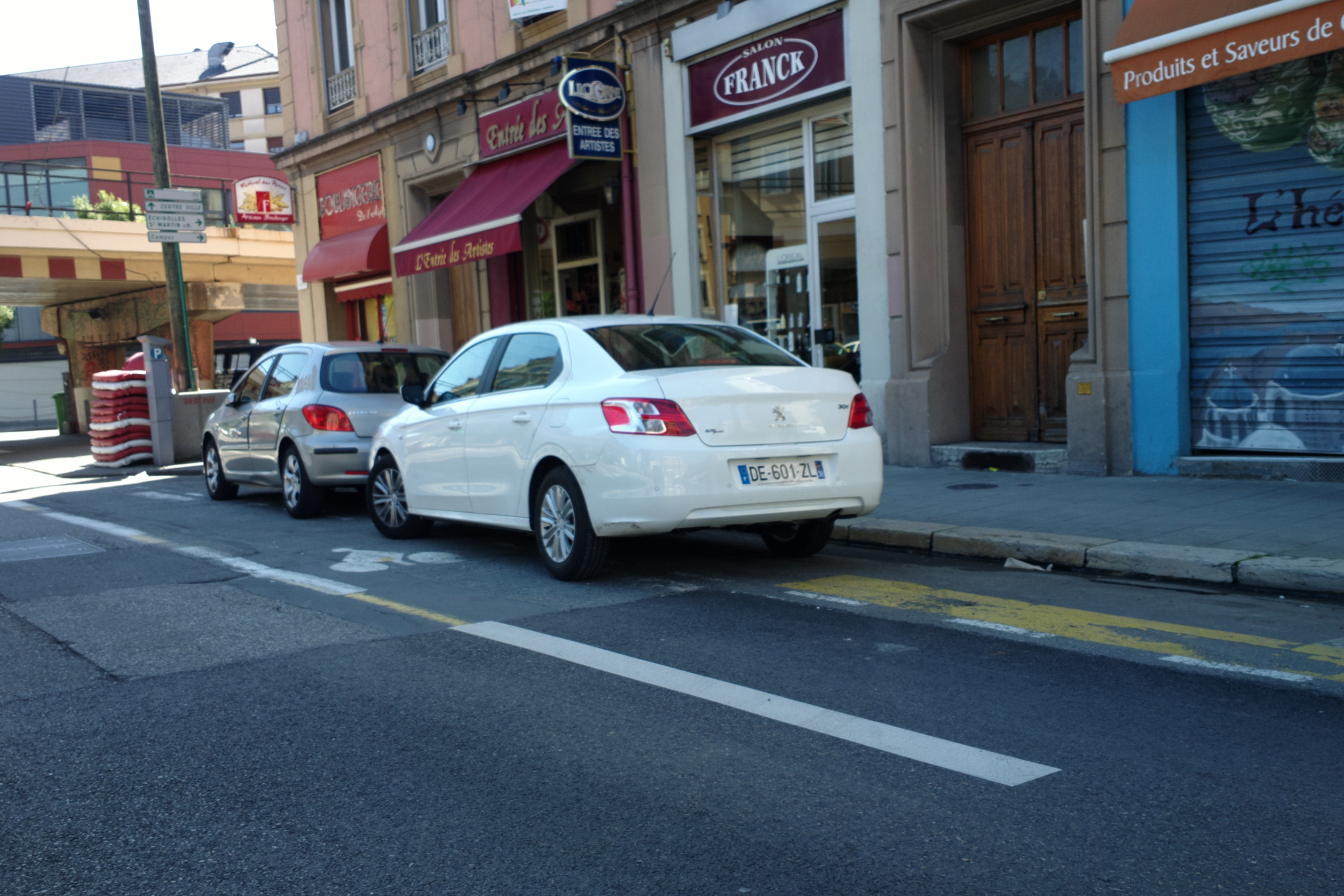 Vue 3/4 arrière d'une nouvelle Peugeot 301 en ville à Grenoble.